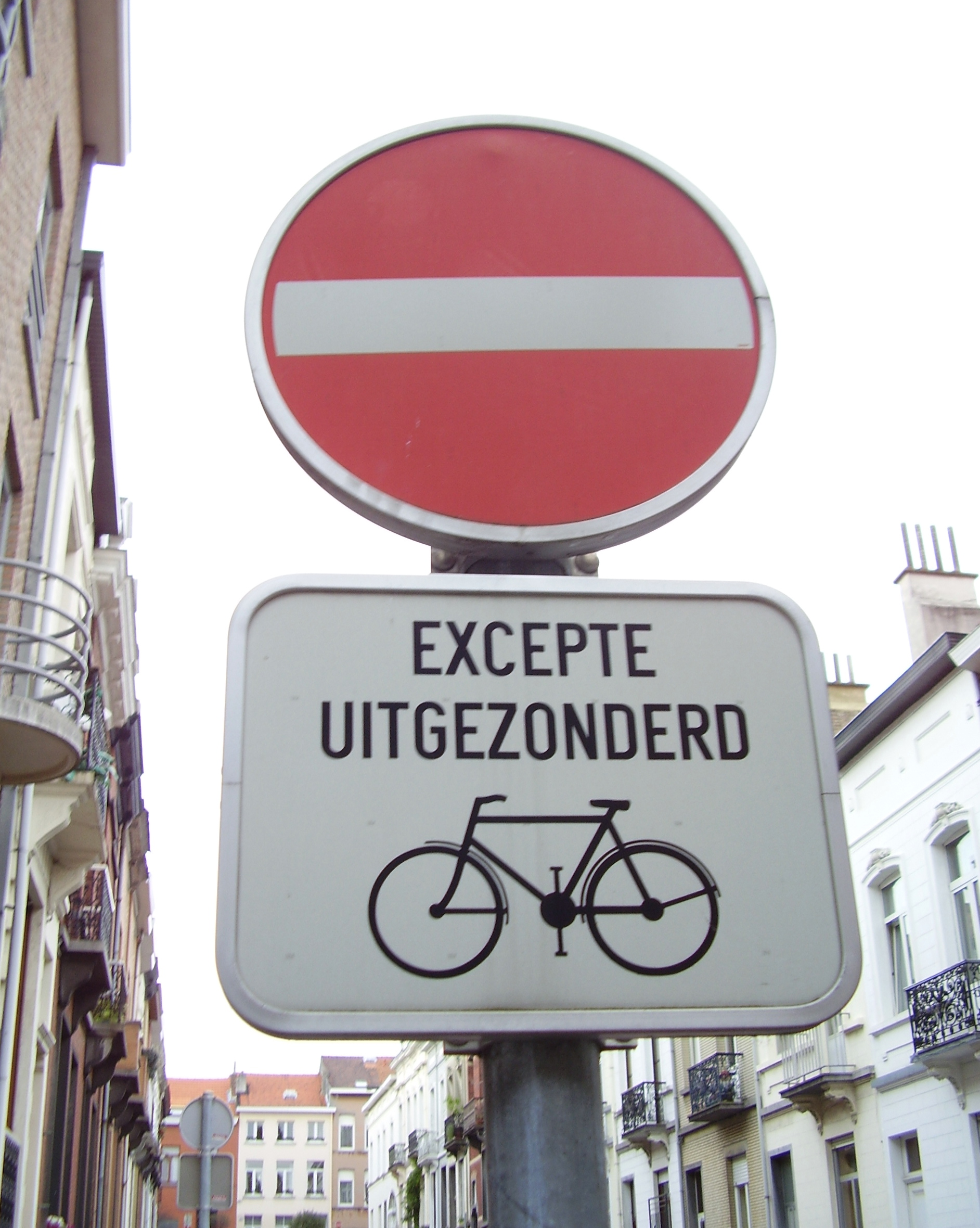 Description: SUL (Sens unique limité aux véhicules motorisés) (Bruxelles) Author: User:Ben2 Date of creation: 24 septembre 2006 Source: Photo personnelle